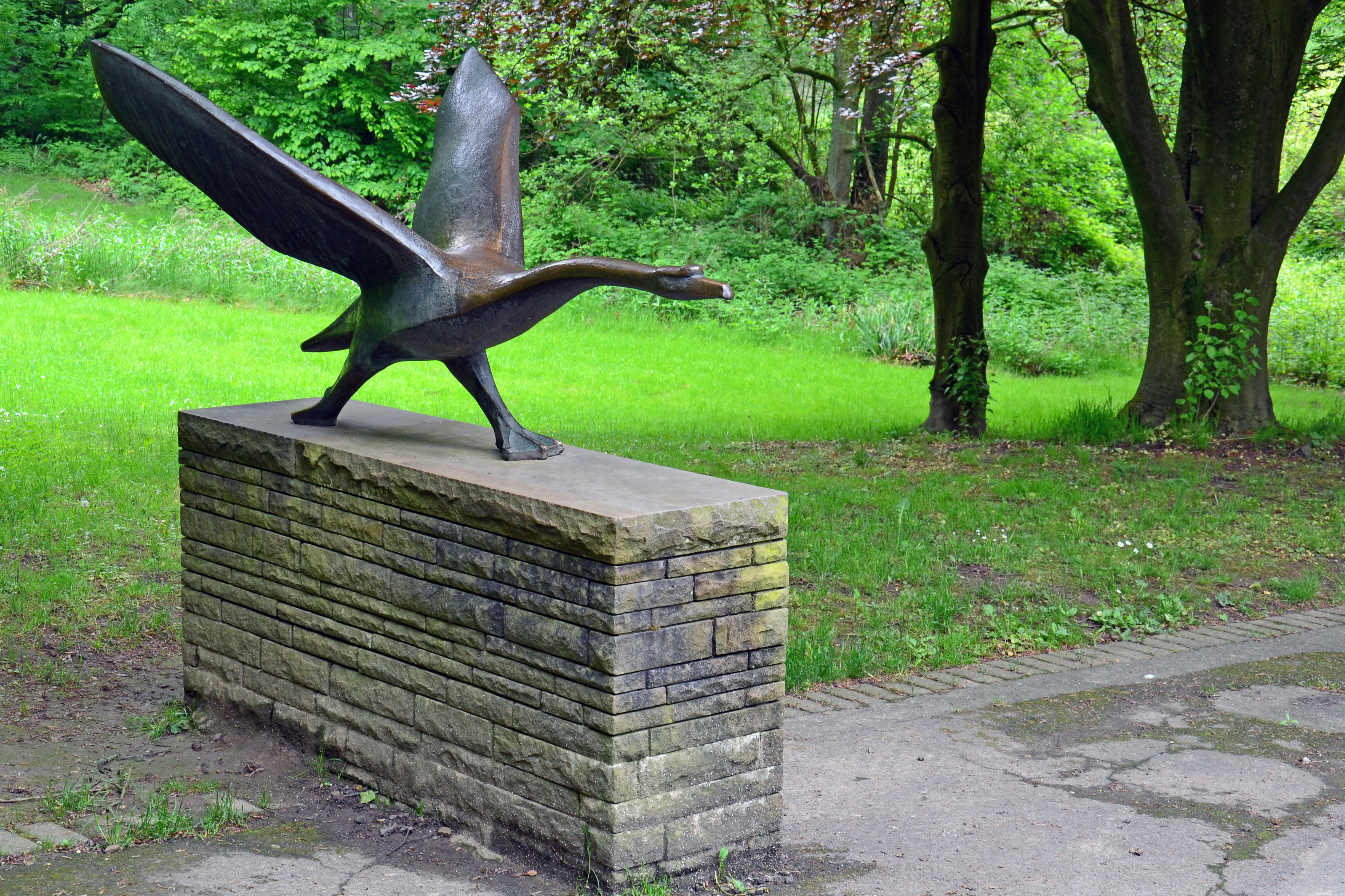 Skulptur im Grugapark Essen: Adam Antes, Auffliegender Schwan 1965